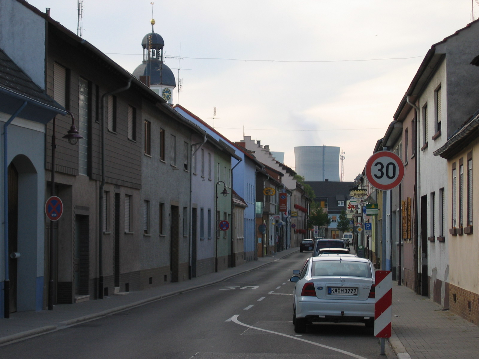 Atomkraftwerk Philippsburg